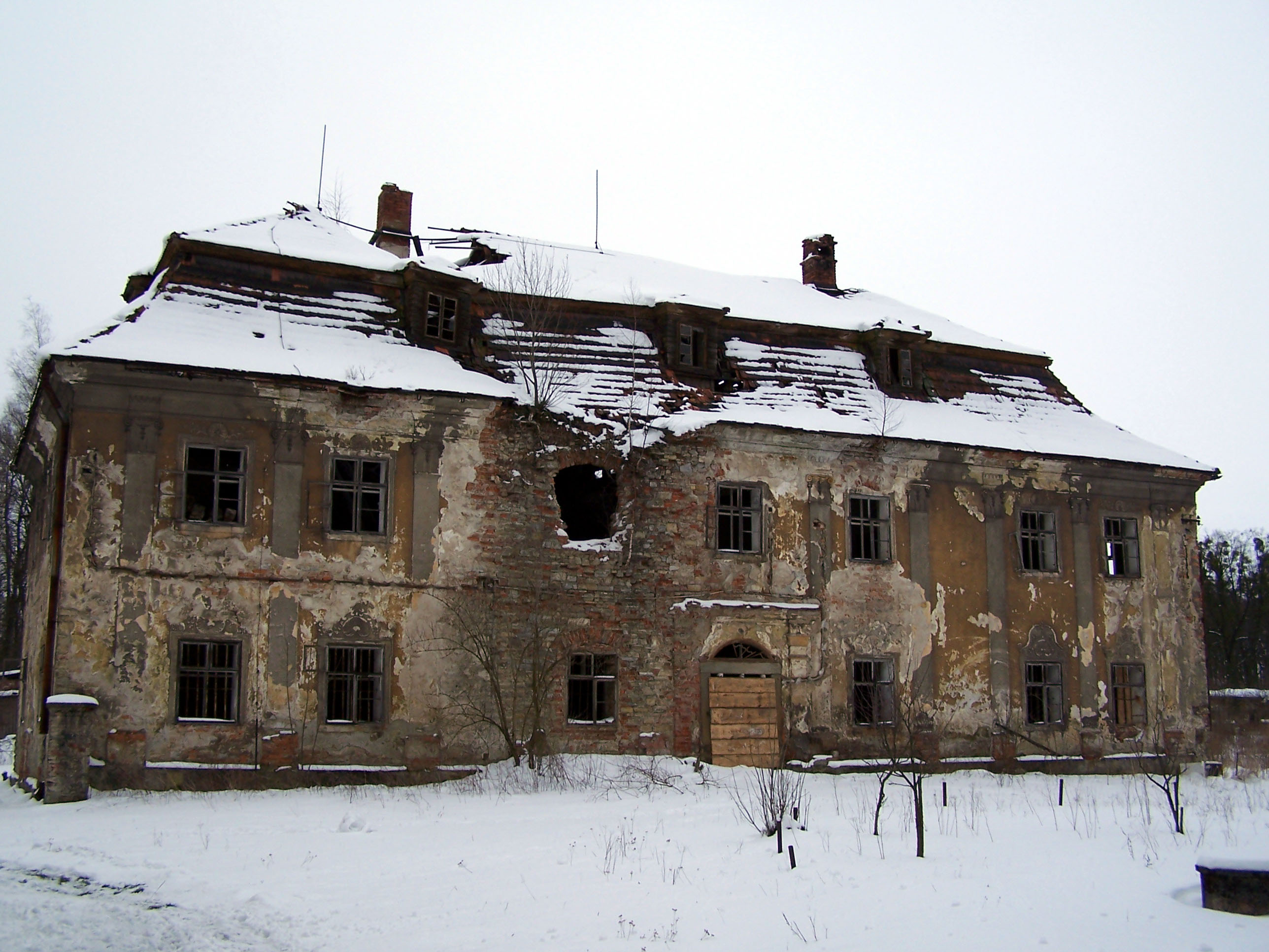 Devastated château in Ropice (Ropica), Czech Republic